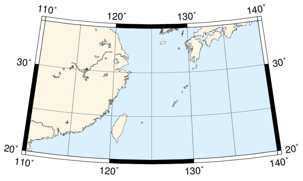 Пример карты в проекции Альберса. Сделано с использованием свободного программного продукта GMT.